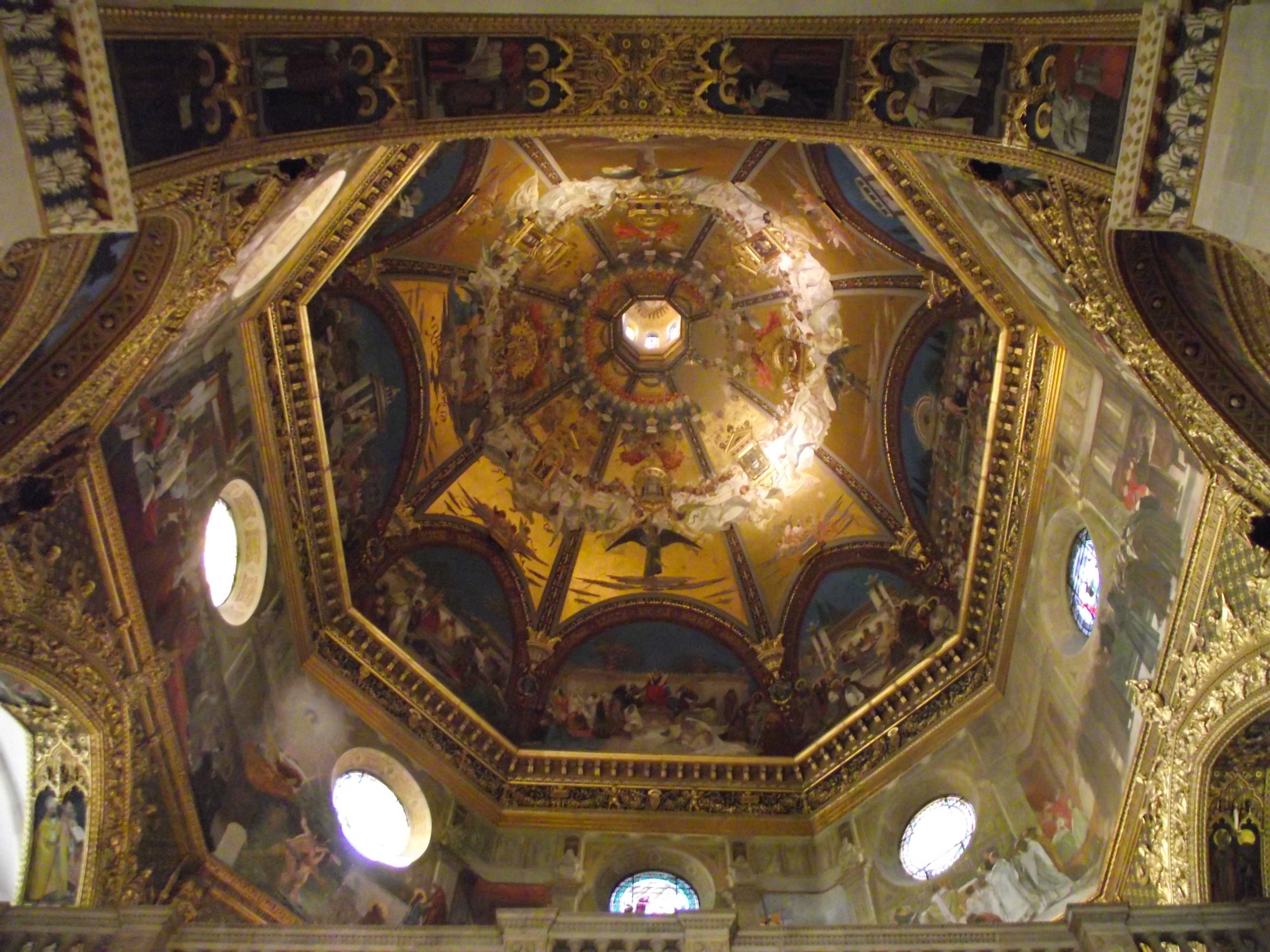 Loreto, Basilica della Santa Casa, la cupola affrescata da Cesare Maccari (1895-1907)